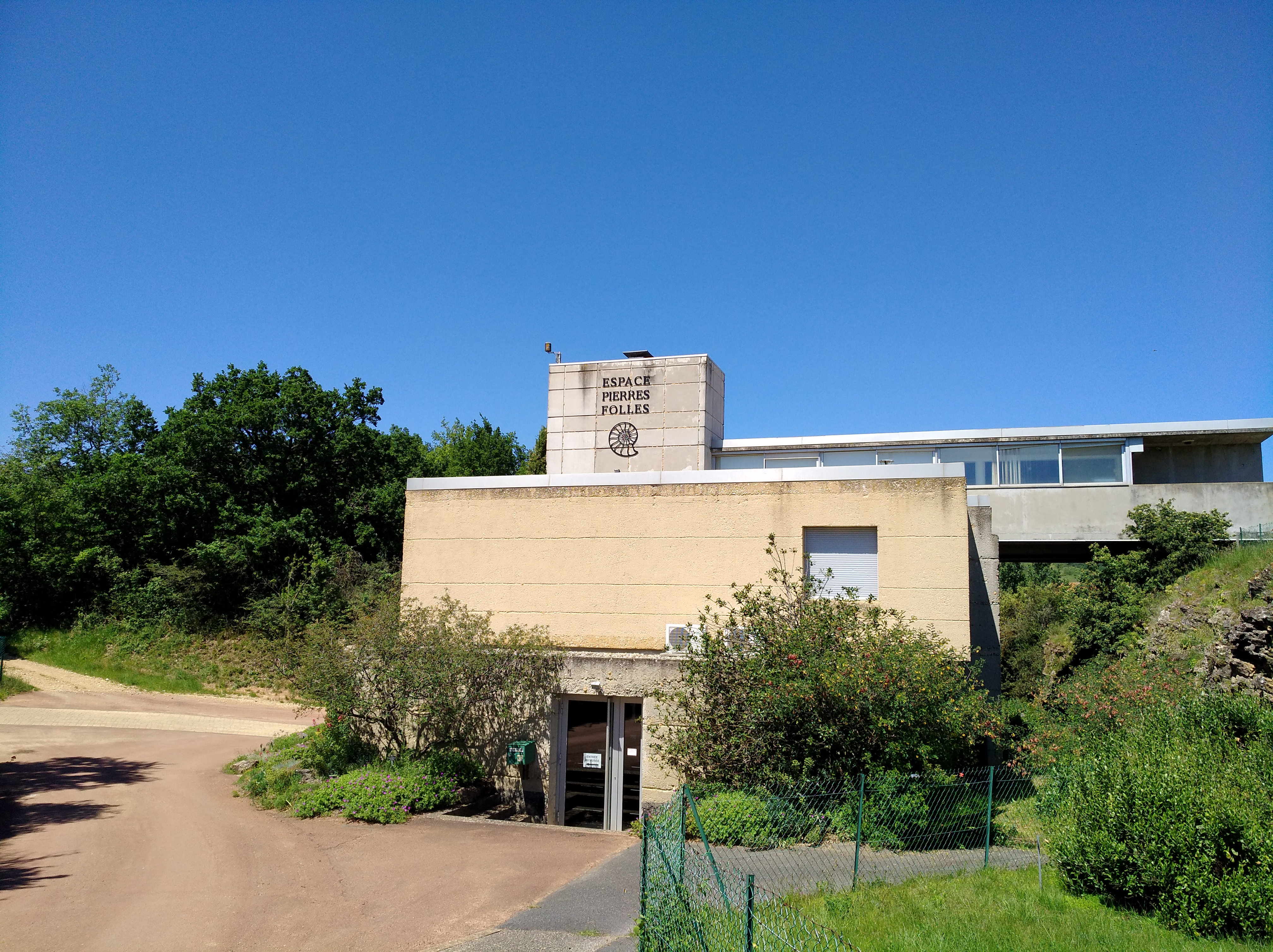 Espace Pierres Folles, à Saint-Jean-des-Vignes (Rhône, France).